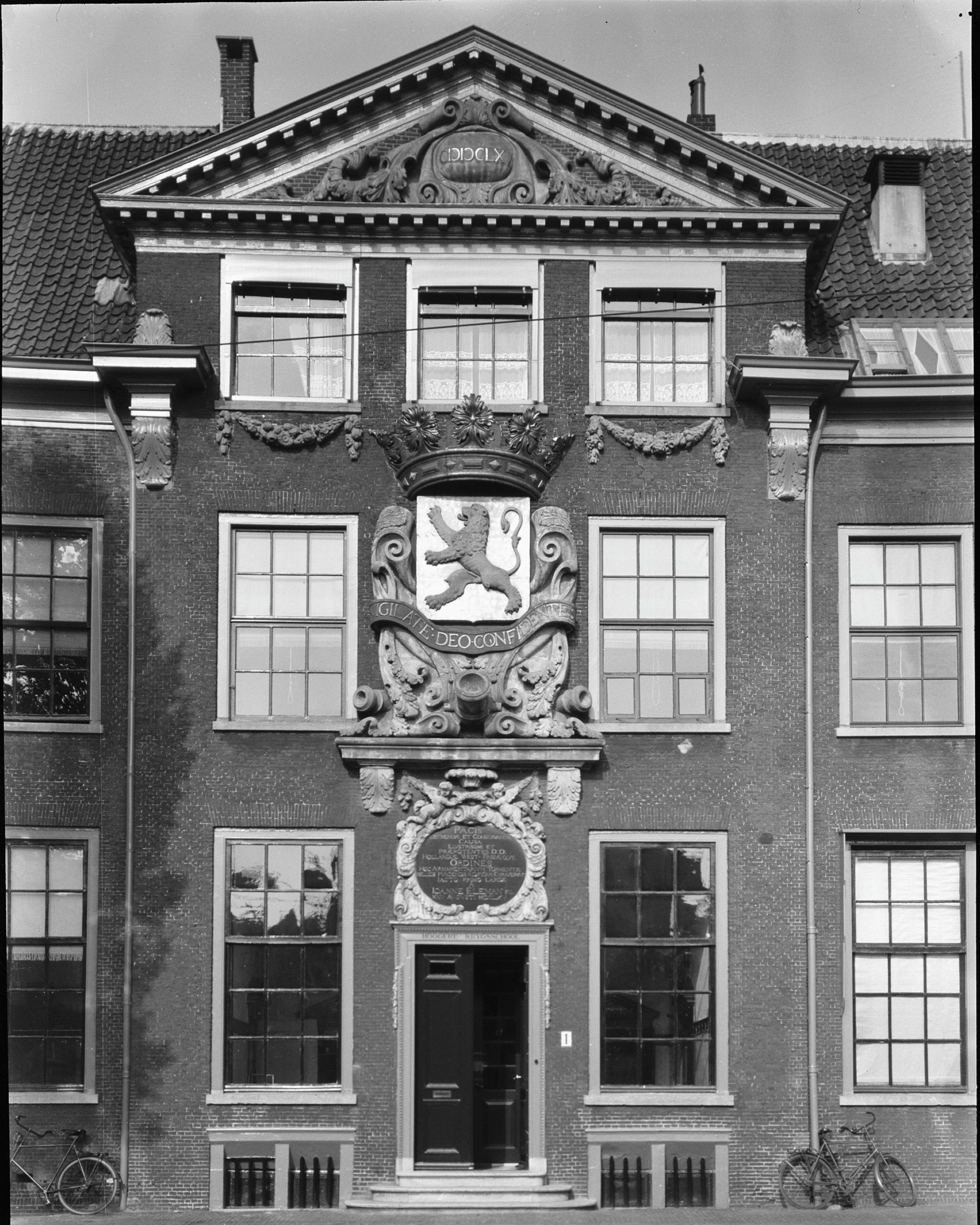 Kanongieterij: voorgevel